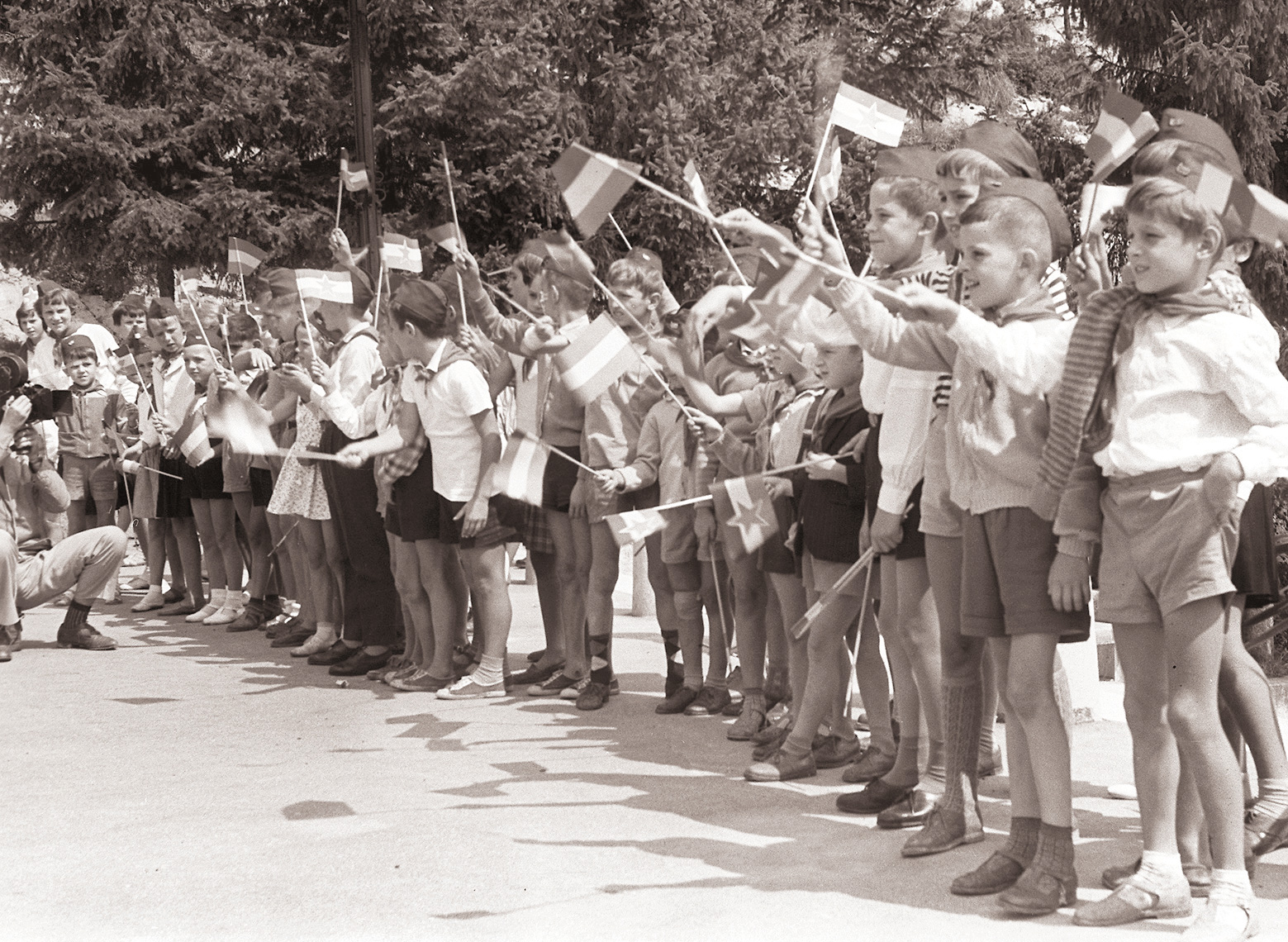 Pionirji ob obisku Josipa Broza Tita in cesarja Haileja Selassieja v Postojni.